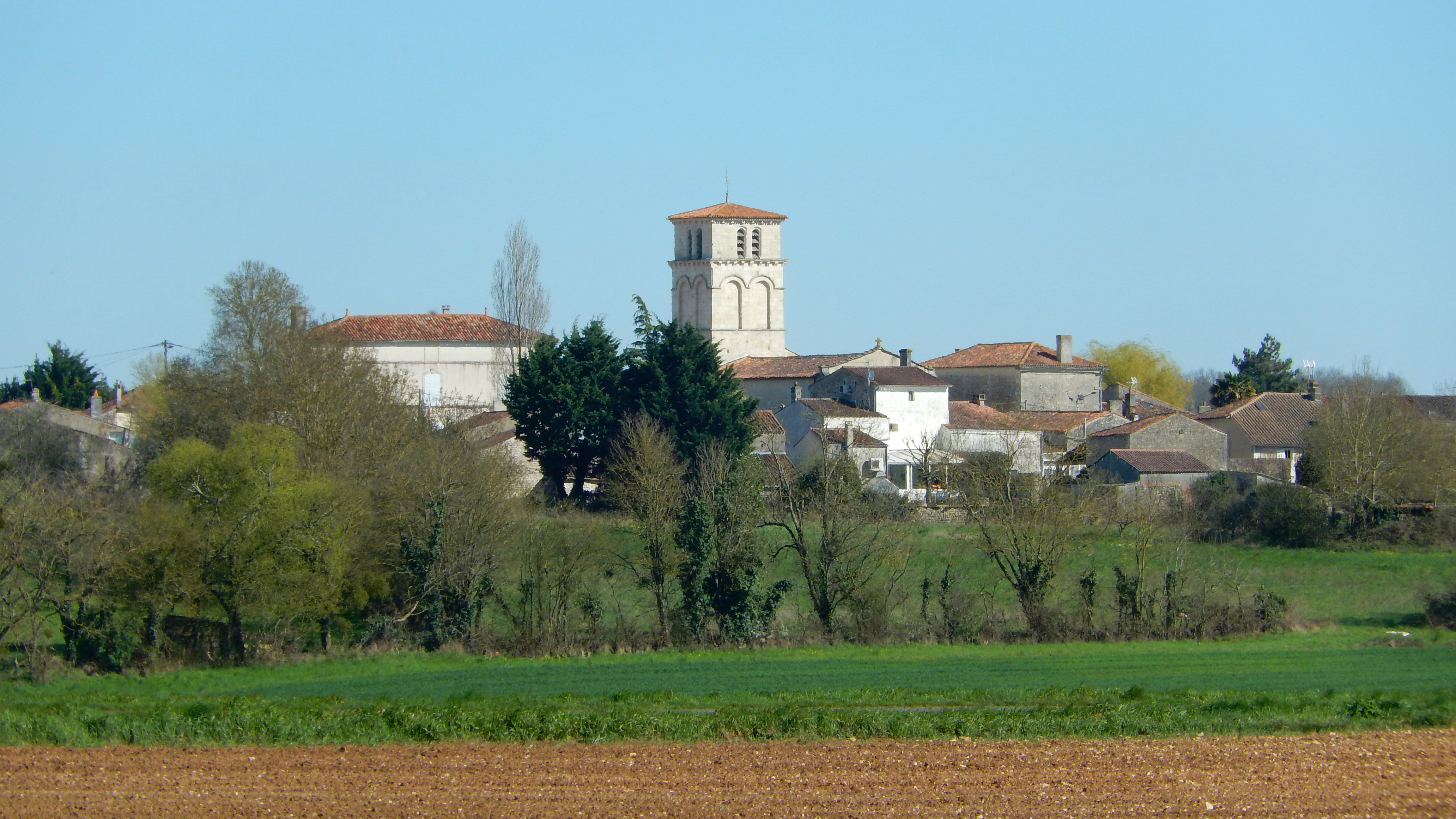 Le village d'Archingeay (Charente-Maritime, France) vu depuis une petite route à l'ouest.